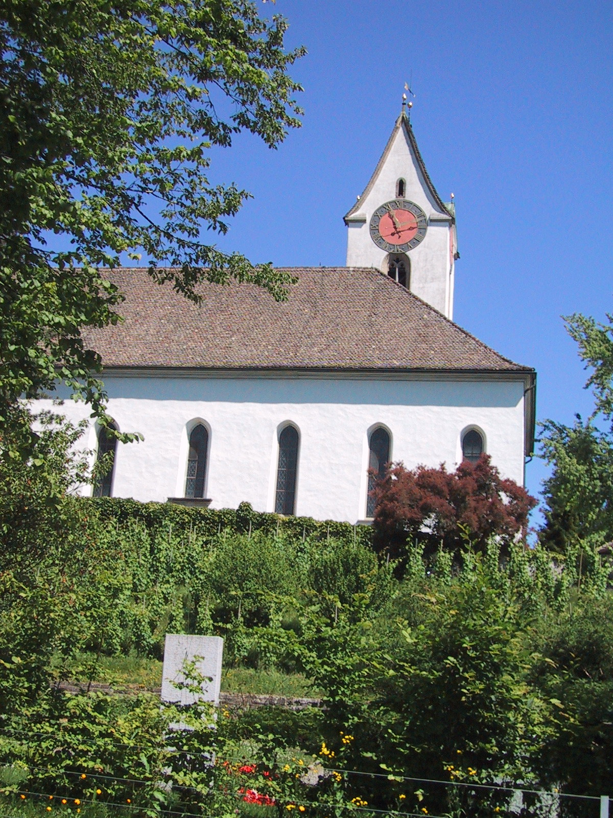 Kirche Egg